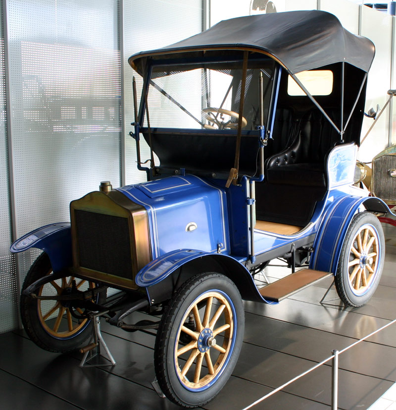 Loreley Fotografiert von Softeis, am 3.10.2004 im EFA-Museum für Deutsche Automobilgeschichte (Löschen) (Aktuell) 00:07, 4. Okt 2004 . . Softeis (Diskussion) . . 800 x 827 (181491 Byte)